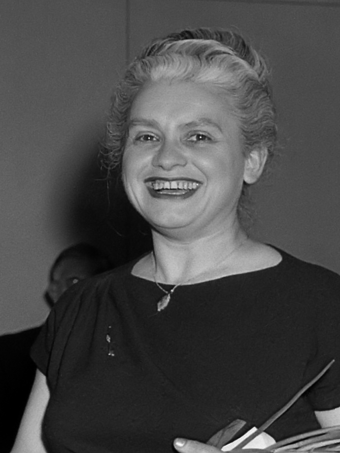 Bekendmaking van de auto van de "Zalenman" in het Amstelhotel door de CPNB, mevrouw A. Rodenburg (l) feliciteert mevrouw De Jong Keesing 4 mei 1960